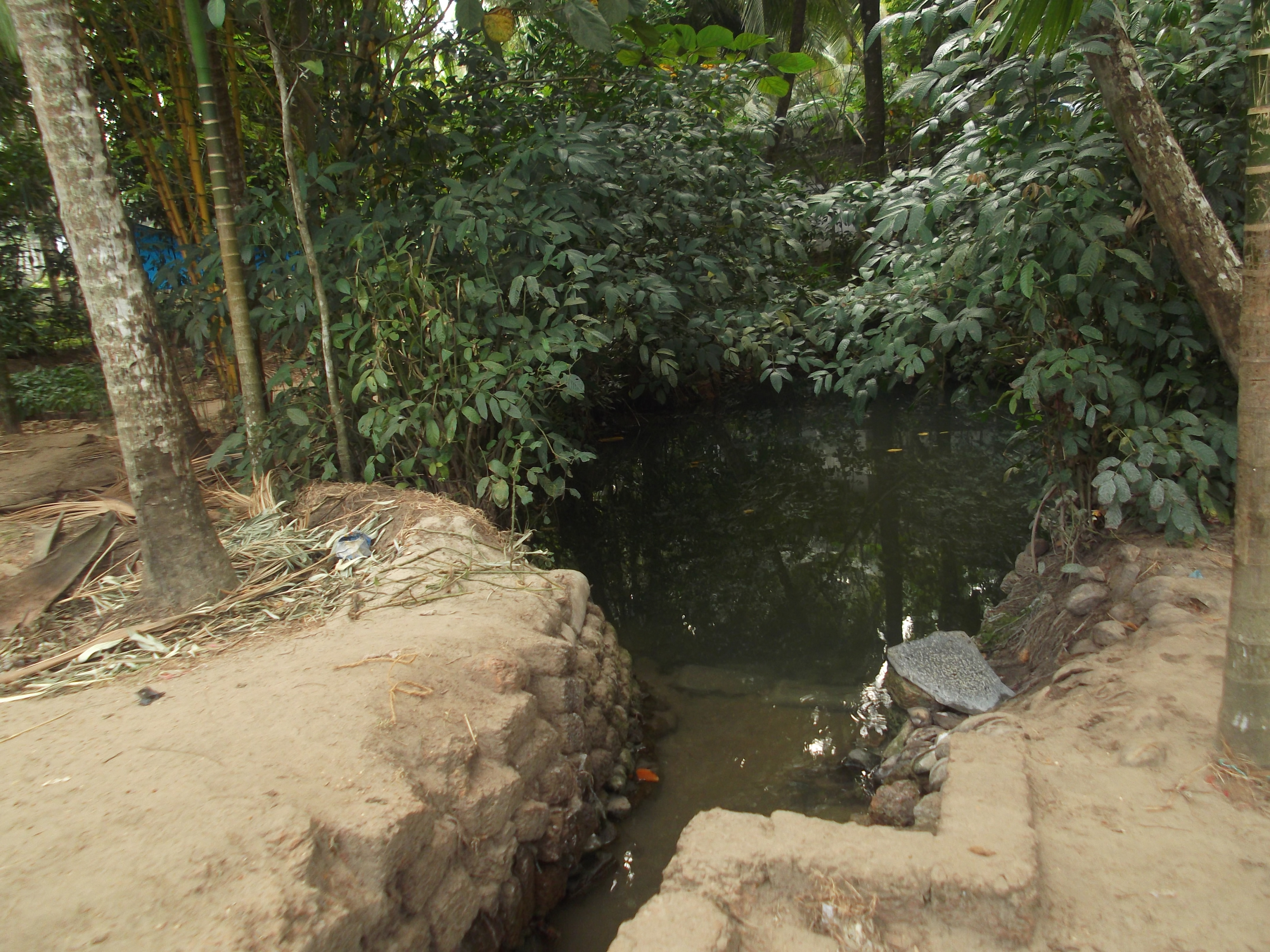 മലപ്പുറം ജില്ലയിലെ പൊന്നാനി വെളിയംകോട് സ്കൂള്‍ പടിയില്‍ കുളത്തിന് ചുറ്റും വെച്ച് പിടിപ്പിച്ചിരിക്കുന്ന ഞഴുക് Leela indica .